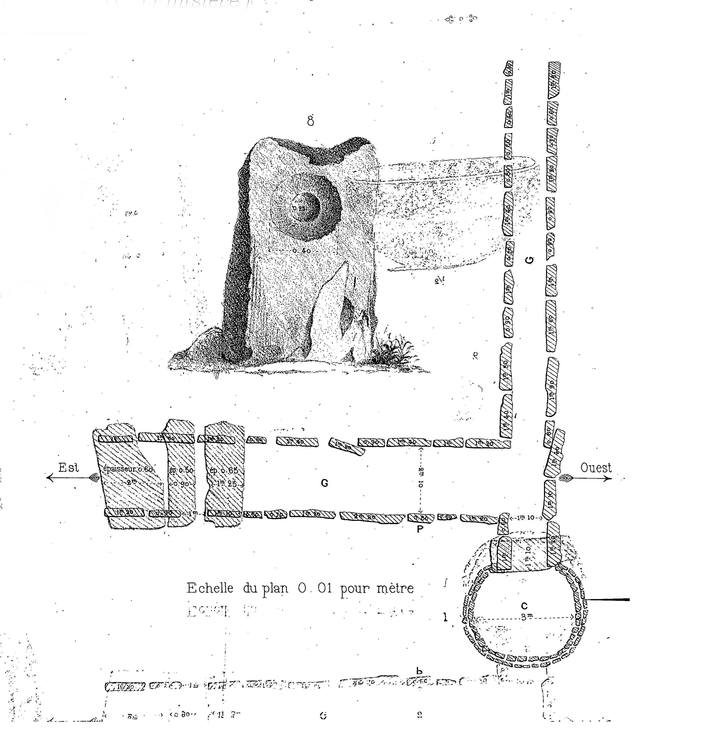 Relevé de la fouille de 1881 de l'allée couverte de Run-Aour, par Paul du Chatellier (« Exploration des tumuli de Run Aour et de la Torche en Plomeur (Finistère) et du kjøkkenmødding de la Torche », Extrait des mémoires de la Société d'émulation des Côtes-du-Nord, Saint-Brieuc, 1881)